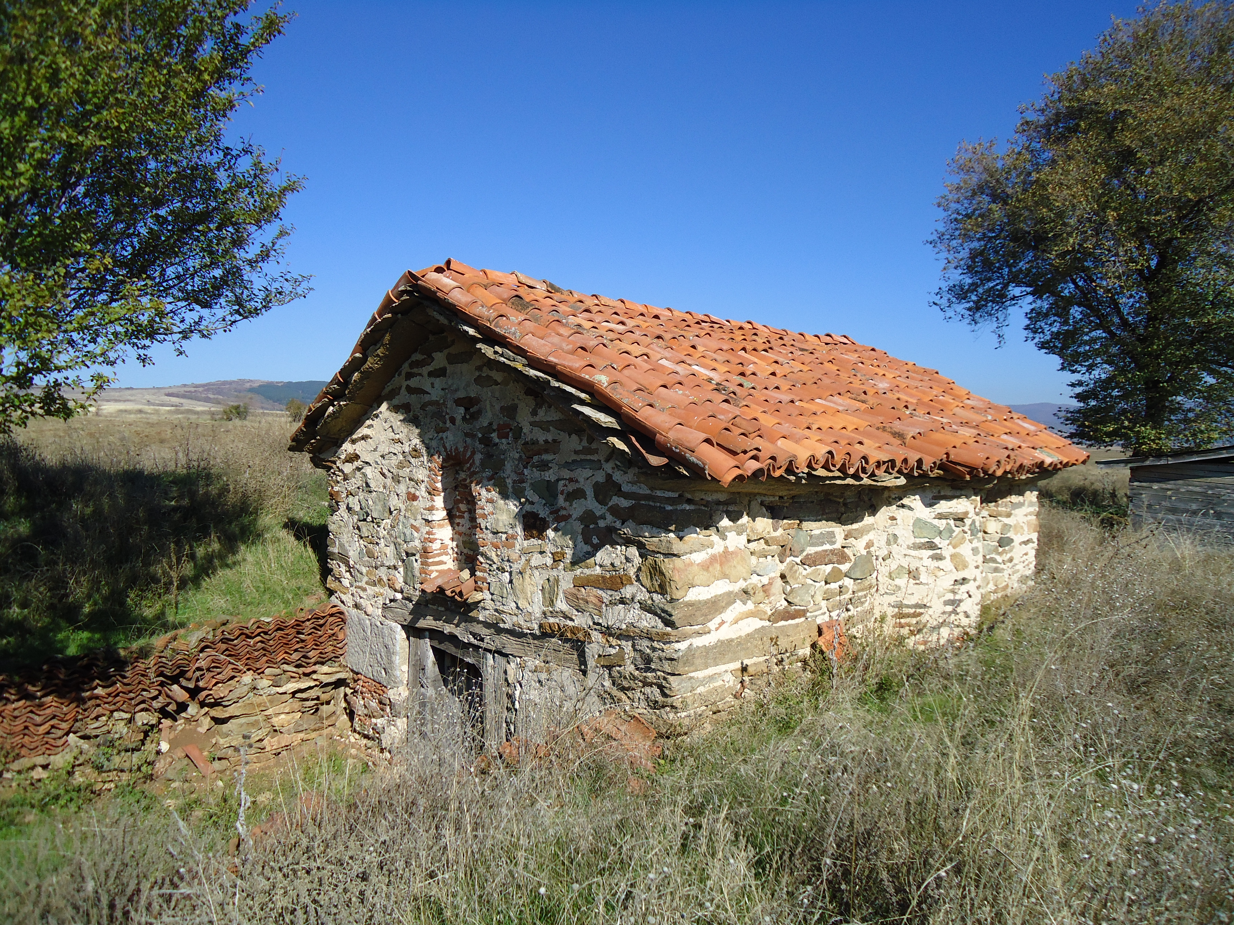 Църквата "Свети Спас" - с.Червен брег, община Дупница